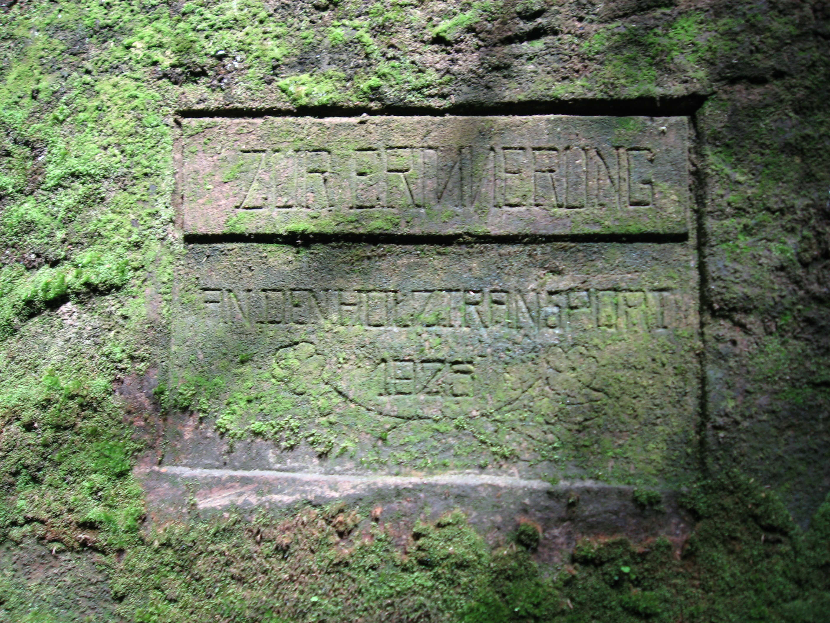 Dürrkamnitz_Tafel1